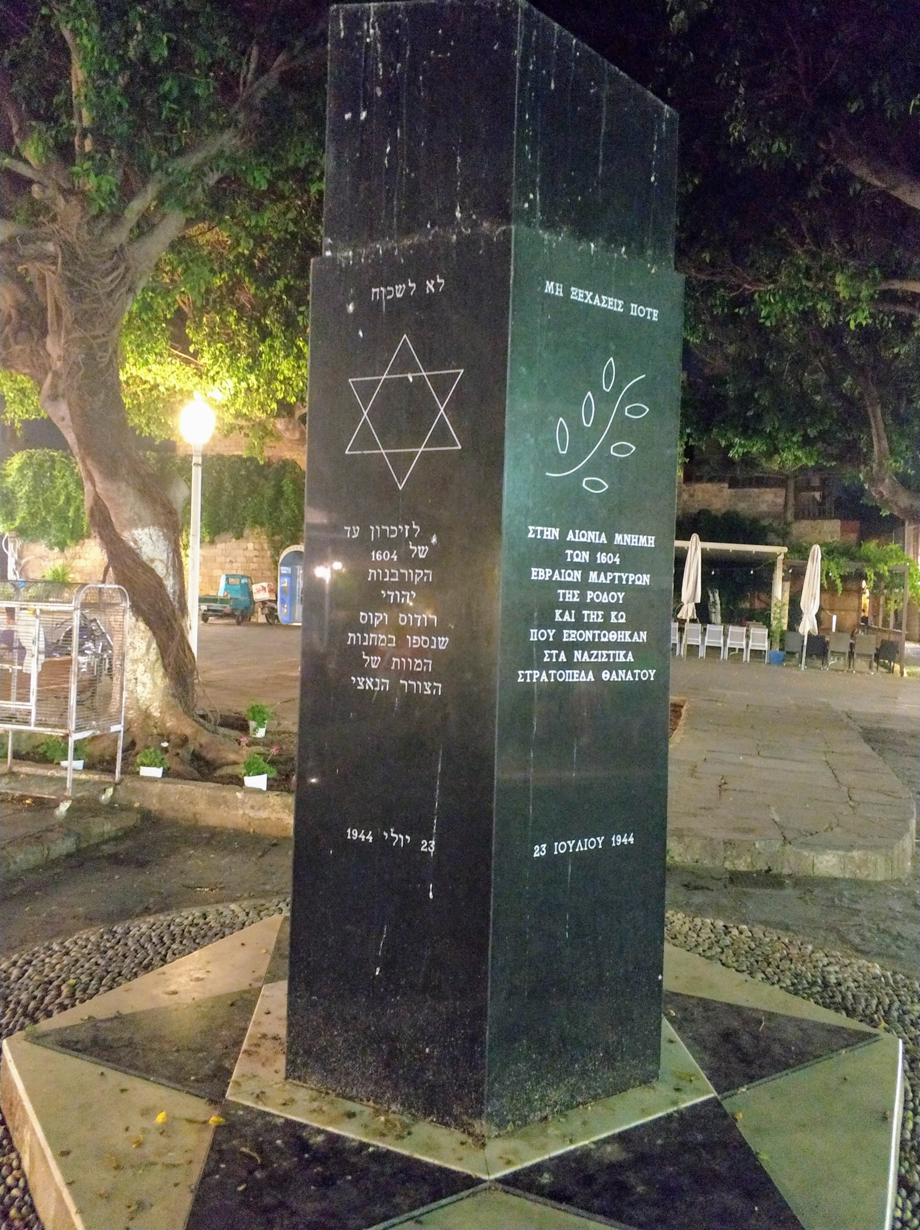 אנדרטה לזכר יהודי רודוס וקוס בכיכר הקדושים היהודים, בעיר העתיקה של העיר רודוס